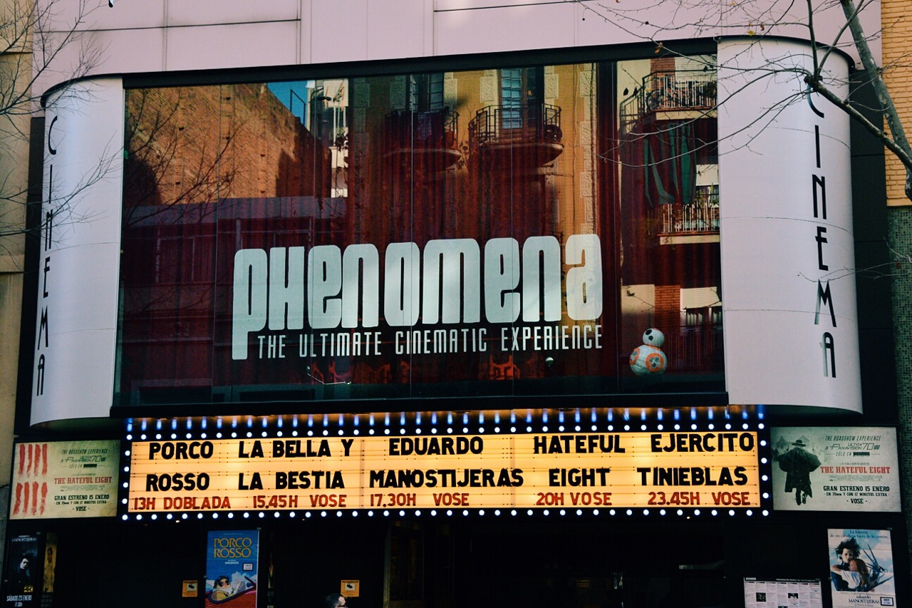 La sala de cine Phenomena se encuentra en la calle Sant Antoni Maria Claret de Barcelona